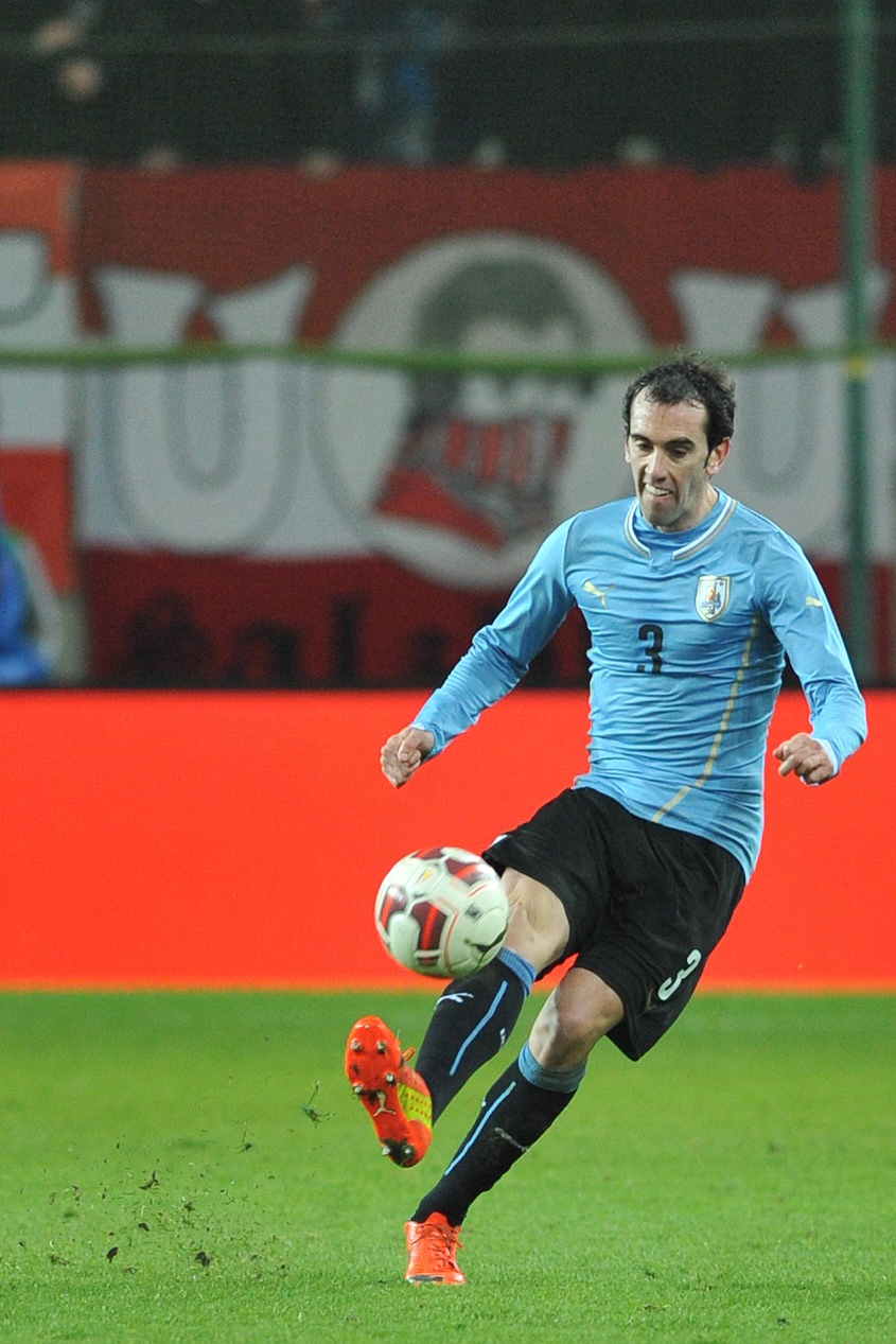 Freundschaftliches Länderspiel Österreich - Uruguay am 5. März 2014 in Klagenfurt: Diego Godín